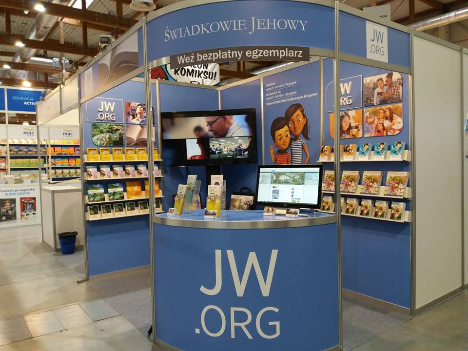 20th International Book Fair in Krakow